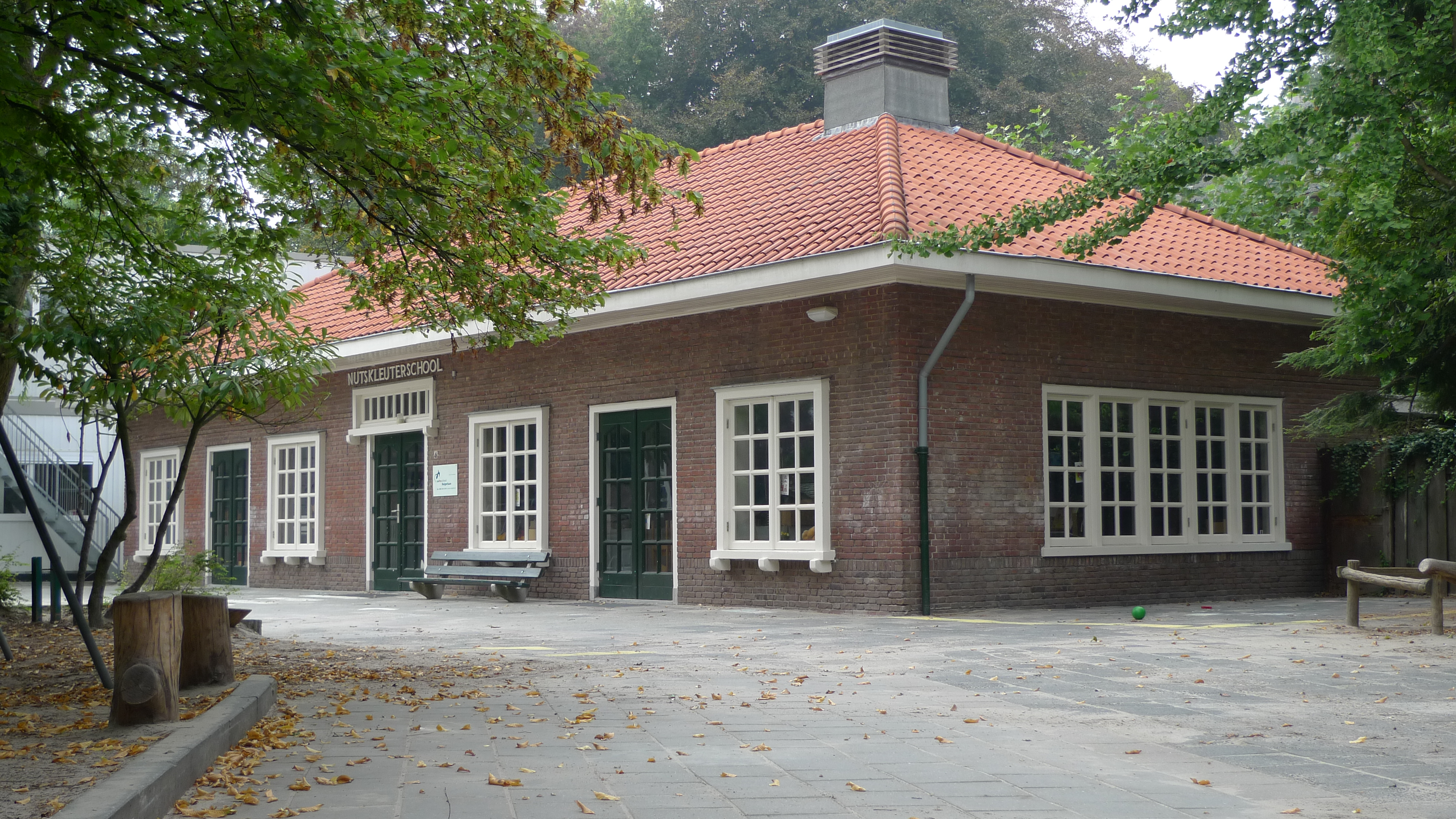 Nutskleuterschool, Nederlands Rijksmonument nr. 518830